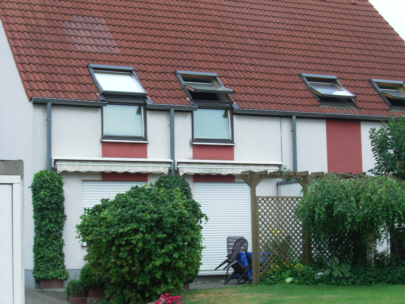 Fassadenanschlussfenster